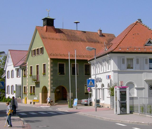 Spielberg (Baden)